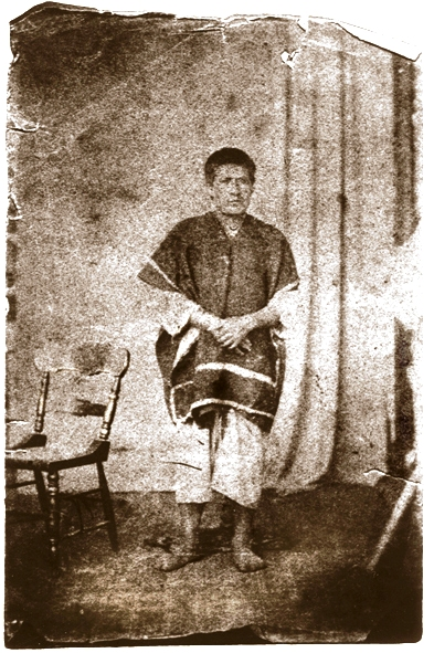 Fotografía del héroe nacional ecuatoriano Fernando Daquilema.